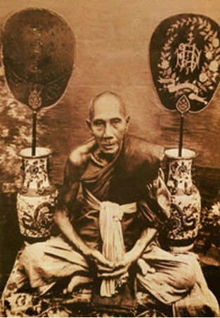 รูปหลวงพ่อกลั่น